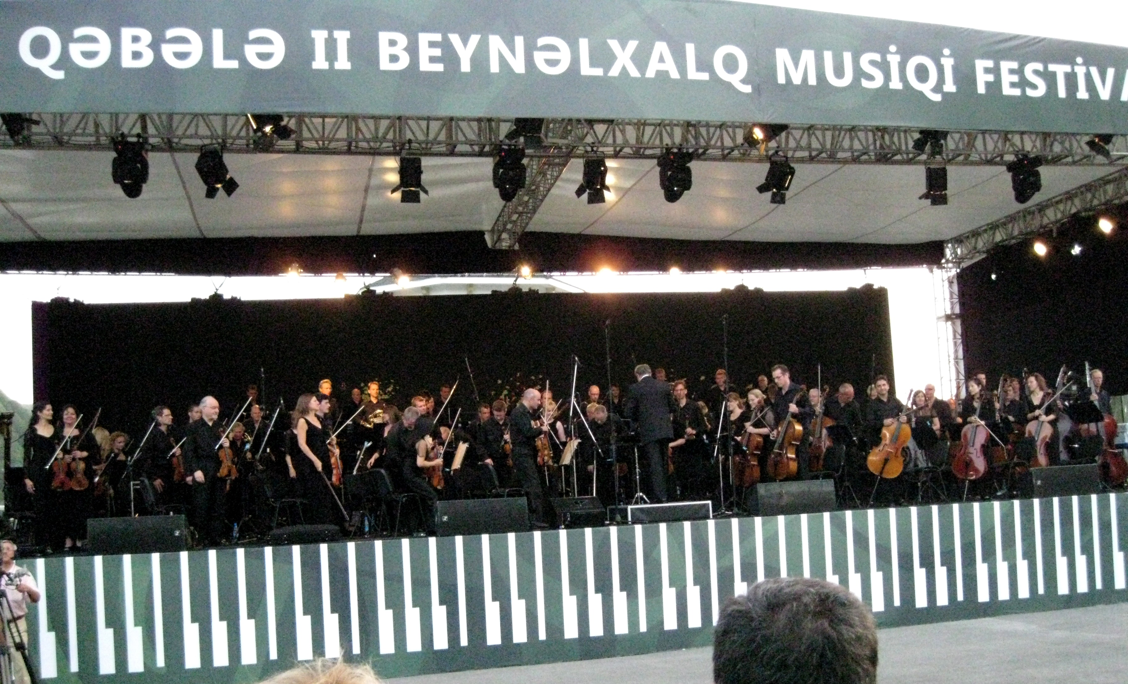 Фестиваль классической музыке в Габале, Азербайджан.